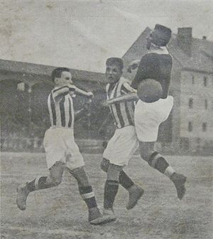 Władysław Przybysz - Reprezentant Warty Poznan w meczu z Cracovią w dniu 3 sierpnia 1924 (pierwszy od prawej).